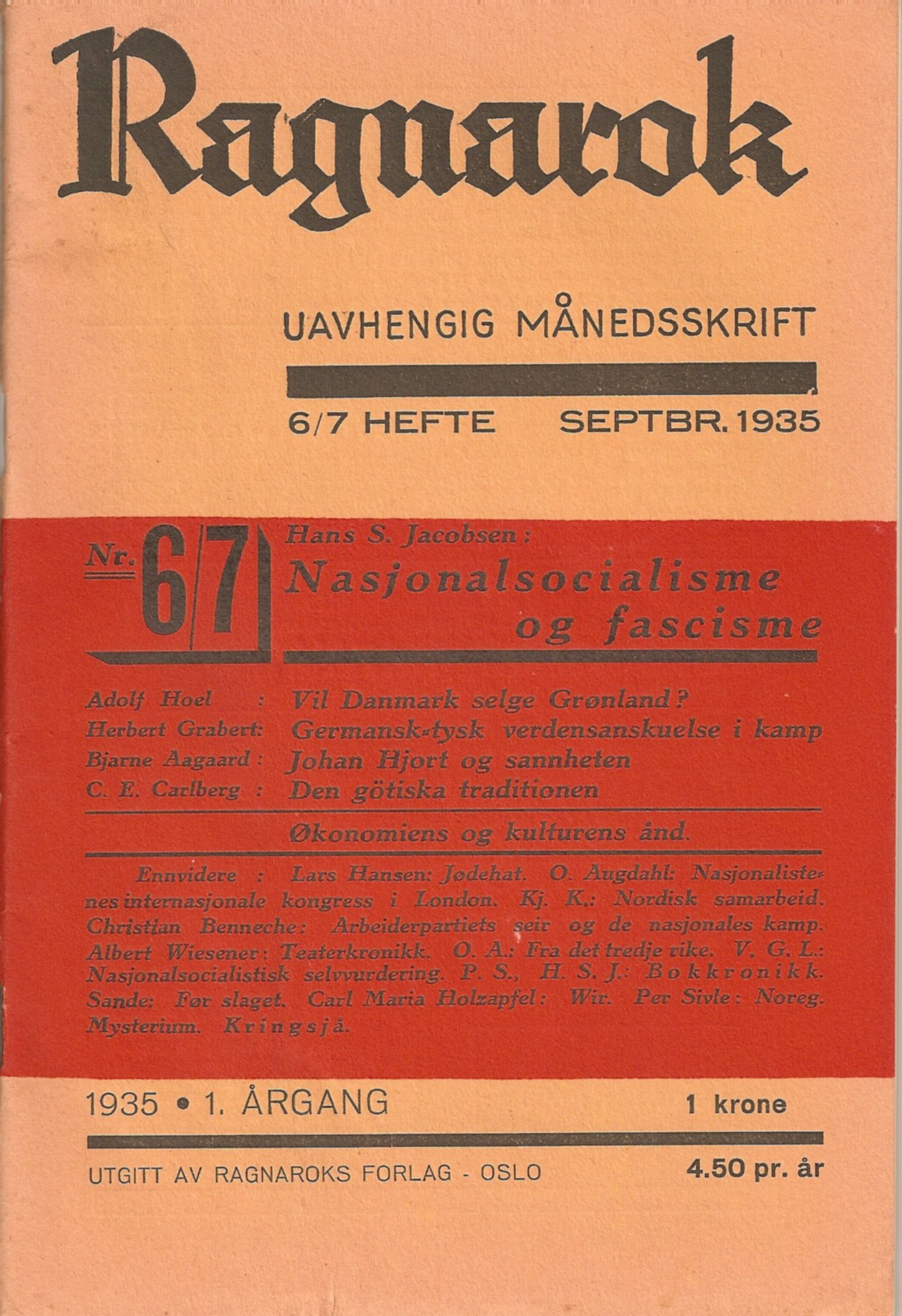 Ragnarok september 1935